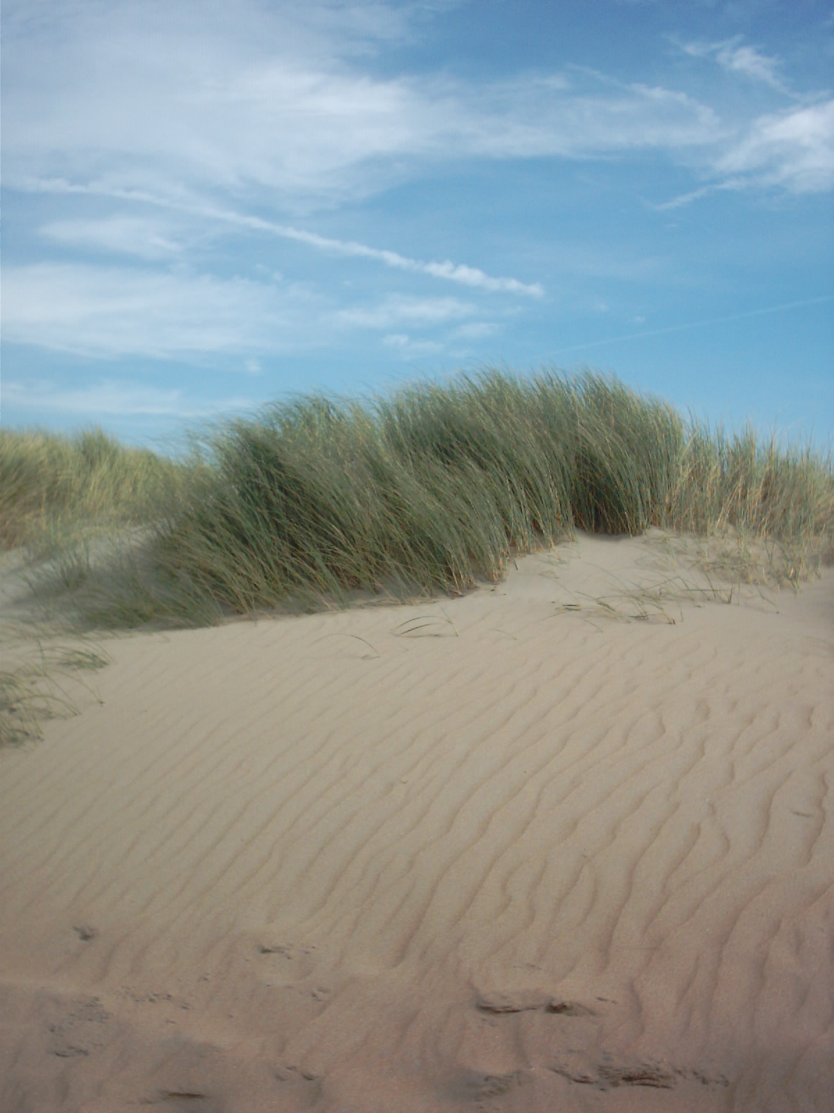 Duintje op IJmuiderstrand